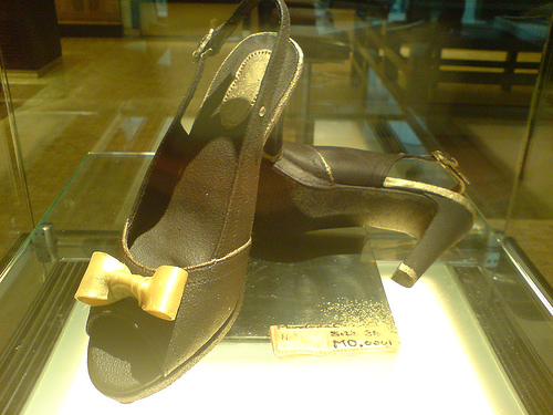 Hong Kong Shoe ShoppingHong Kong Shoe Shopping